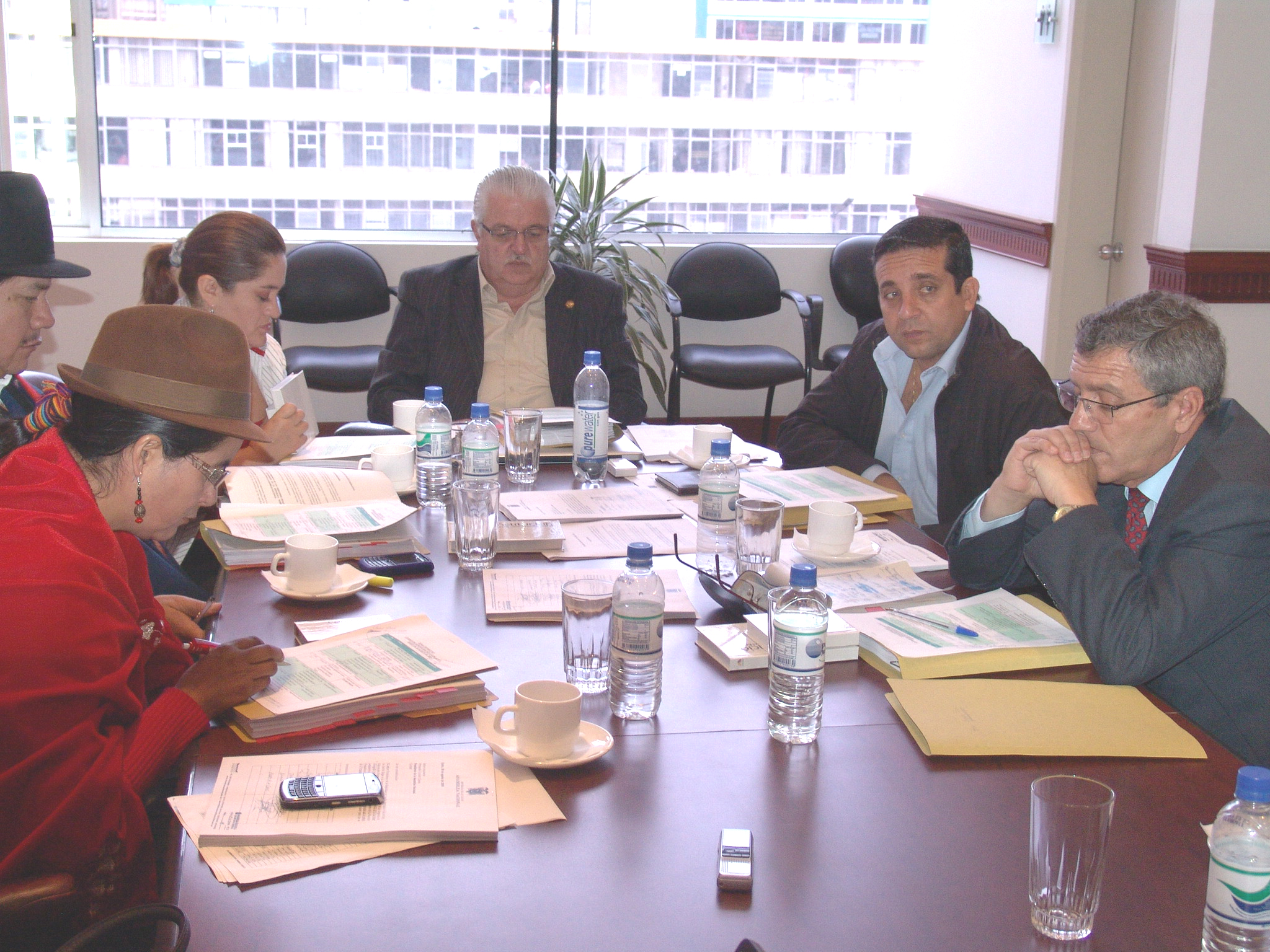 Sesión del CAL